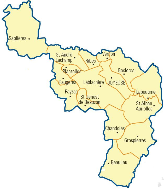 Carte détaillée des communes du canton (Ardèche)